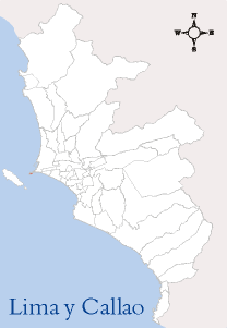 Localización del distrito de La Punta Esta imagen ha sido elaborada por --Edgardo Reyes 18:36 9 mar, 2005 (CET) Categoría:Mapas del Perú (imagen)